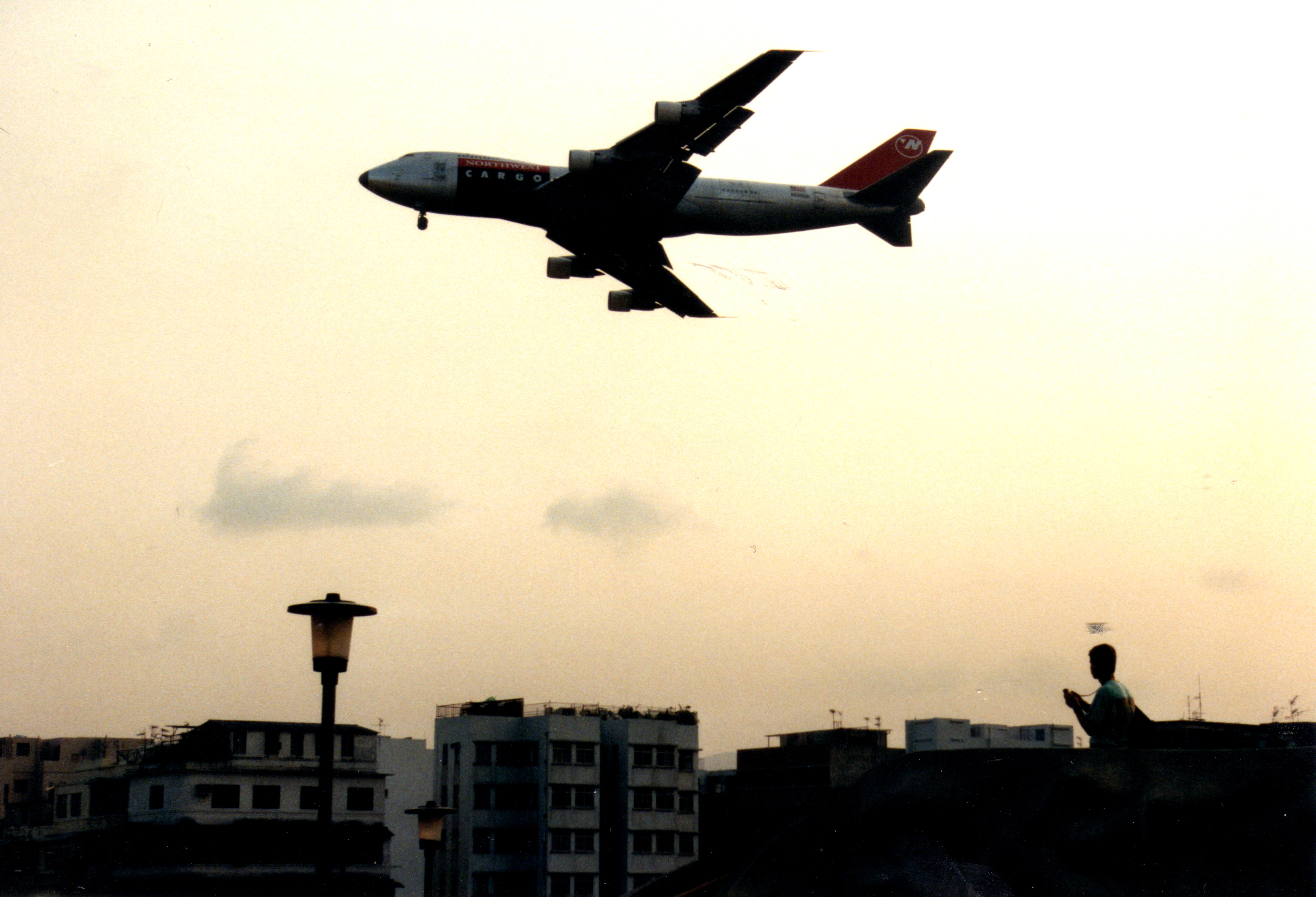 Planes landing at Kai Tak